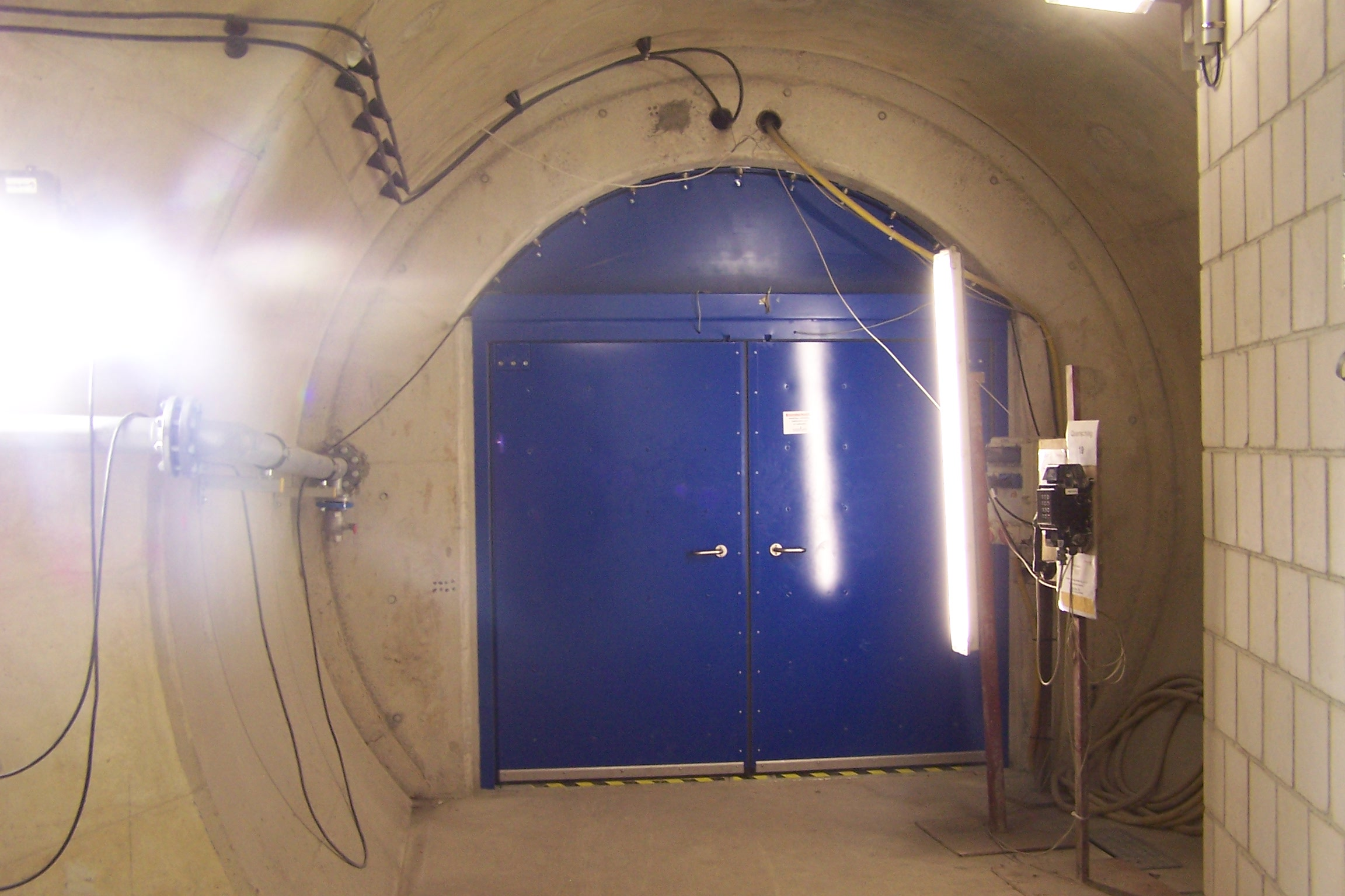 Türe des Querstollen 19 im Katzenbergtunnel Richtung Weströhre